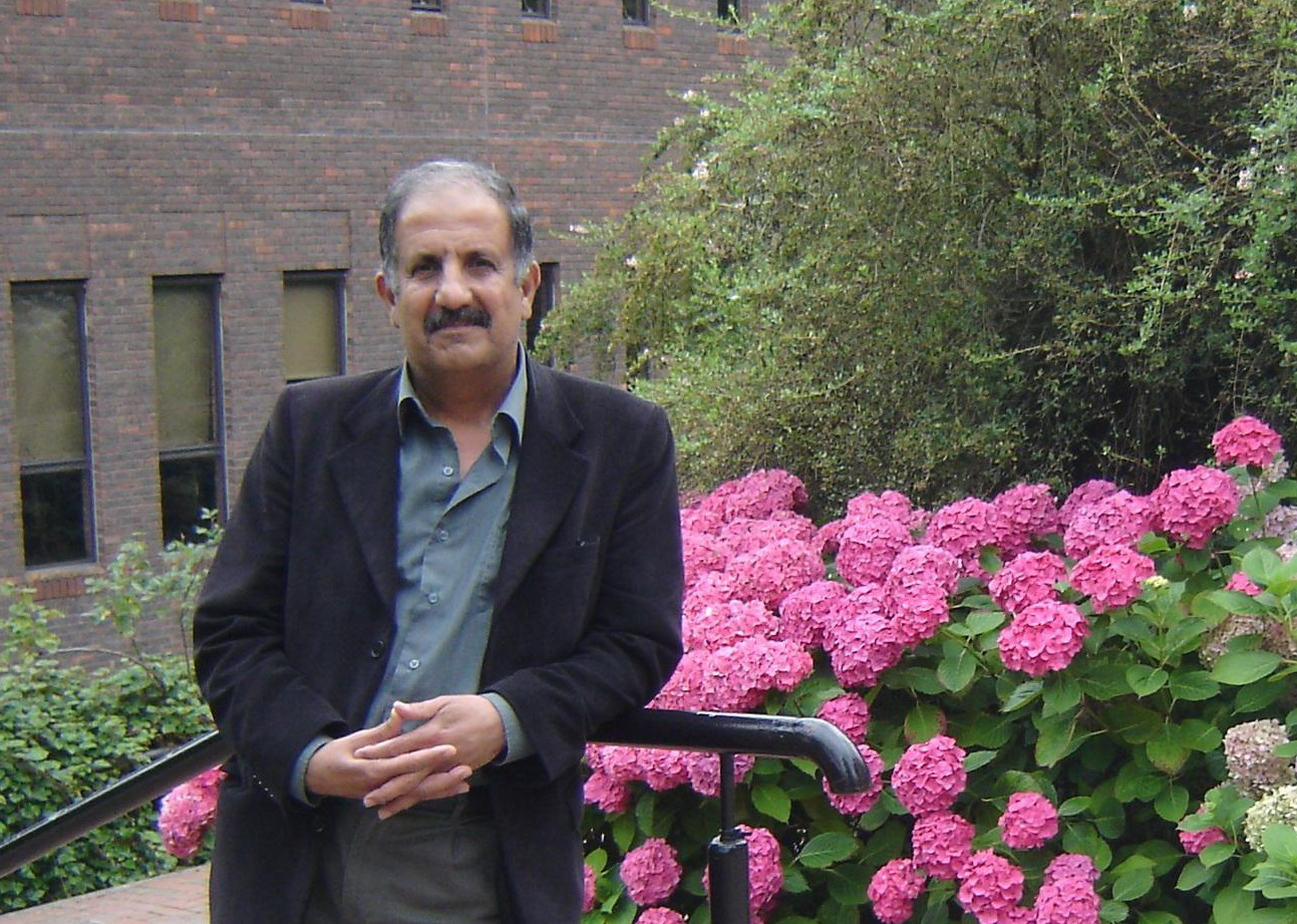 د. نجم عبد الله كاظم